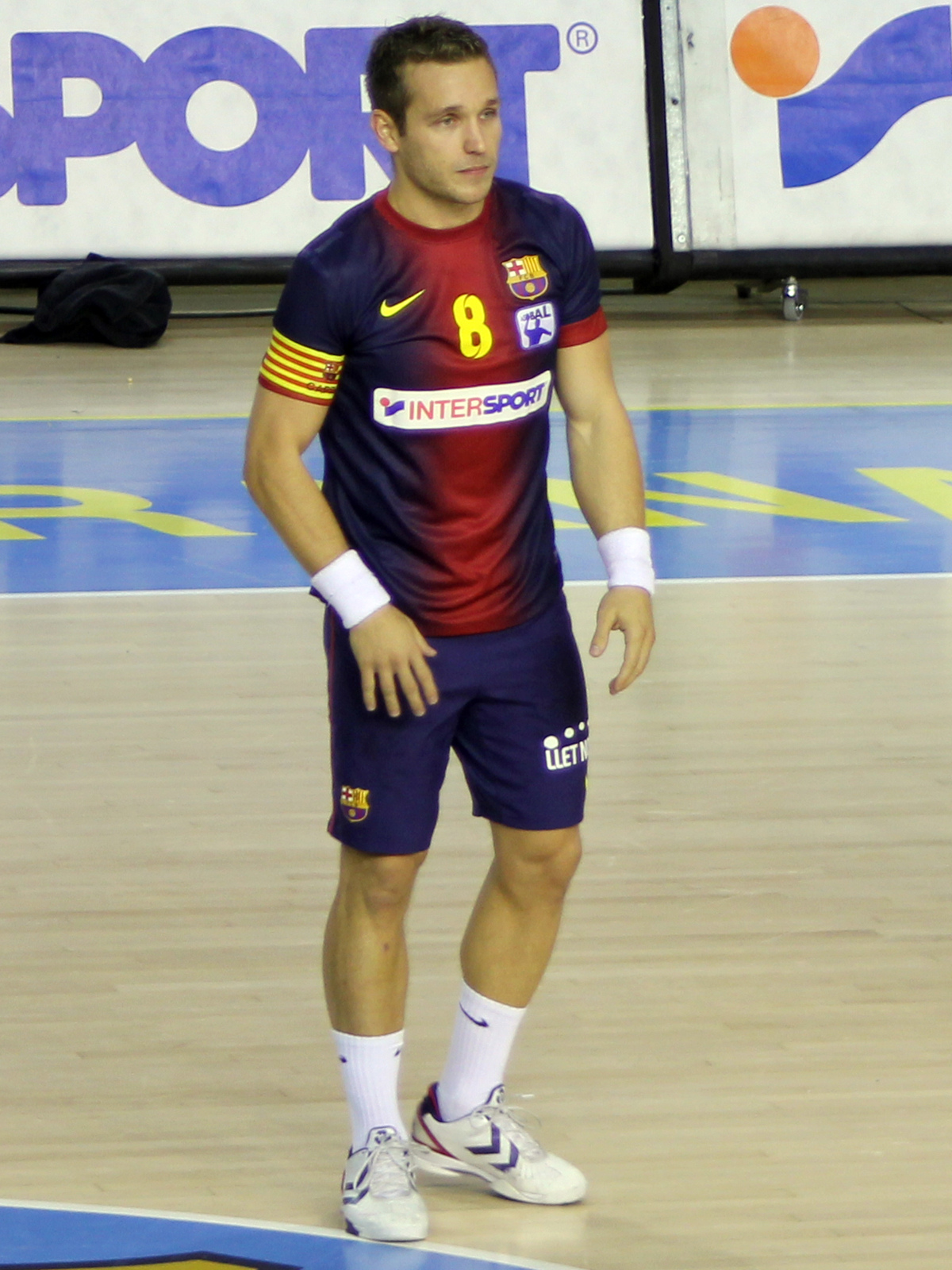 Victor Tomás in a 2012-13 Barcelona uniform. Foto realizada por Javier Segura (@castroquini)